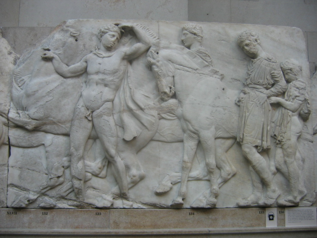 Elgin Marbles, British Museum, London : Frise Ouest, XLVII, 136-132